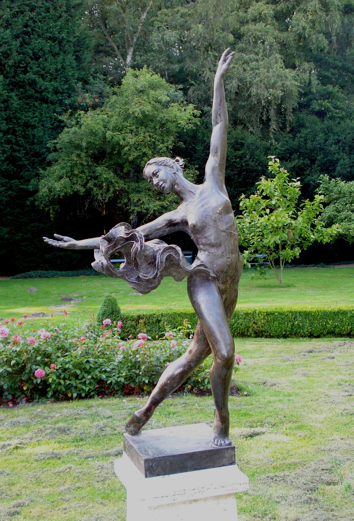 Den Haag, Park Clingendael. Kunstwerk "Dansend meisje" van Jean en Marianne Bremers. The Hague/The Netherlands.